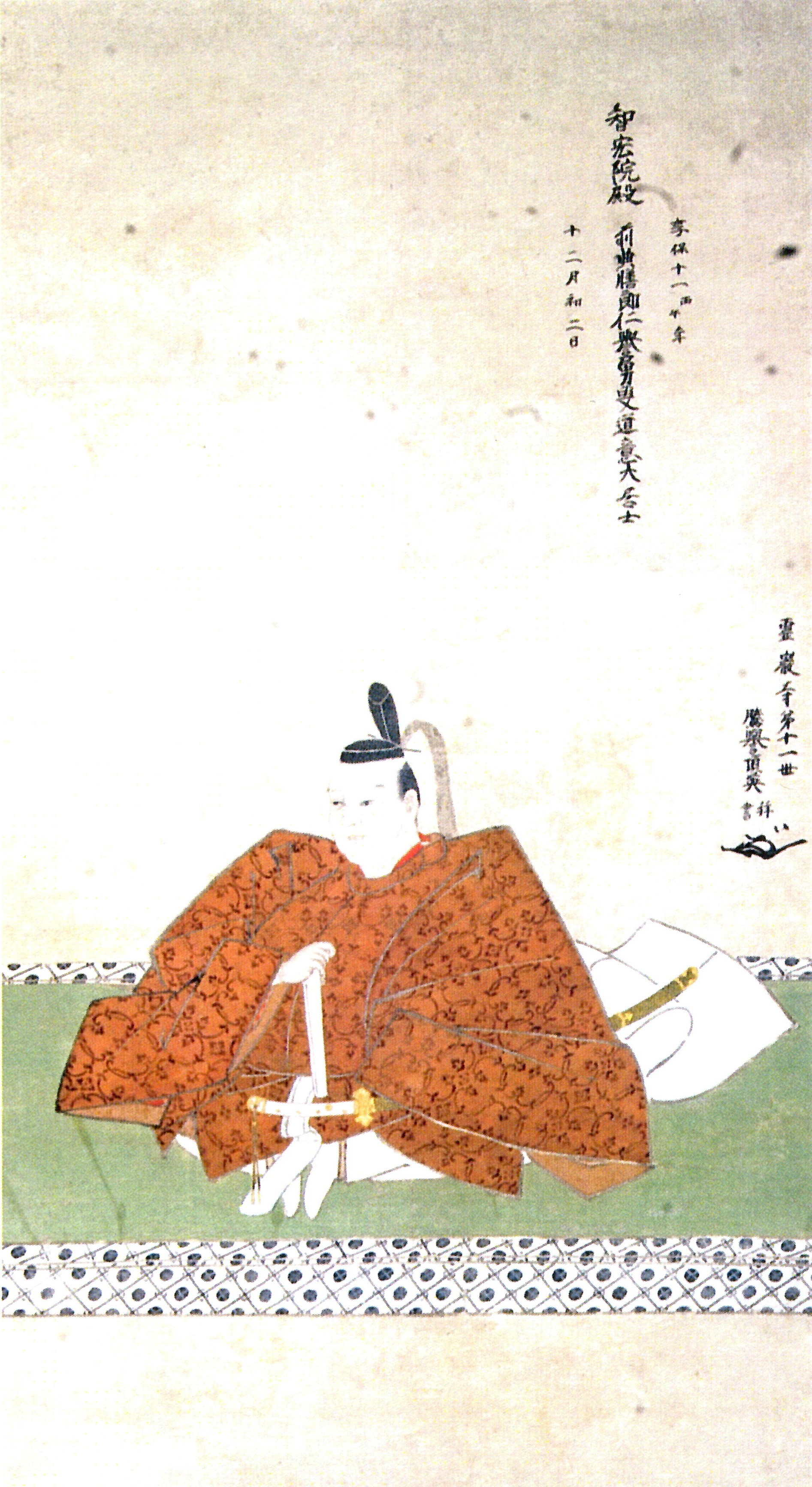 京極高明の肖像。